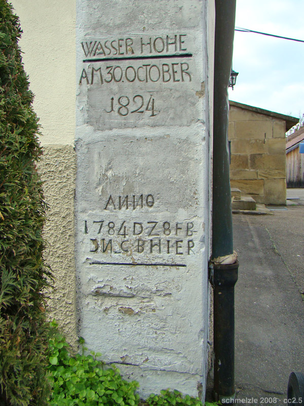 Historische Hochwassermarken in Neckarmühlbach